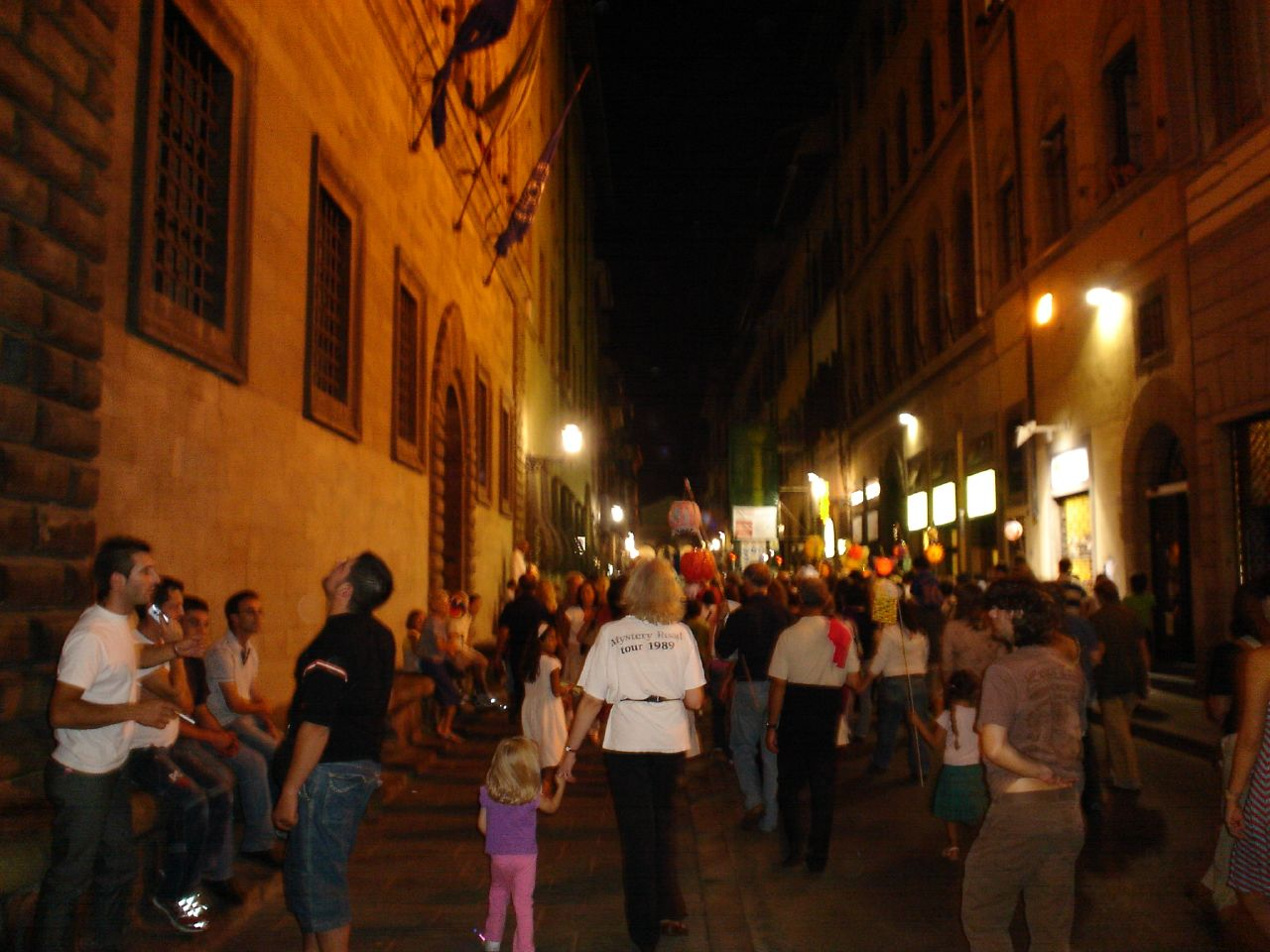 Rificolone in Via dei Servi a Firenze